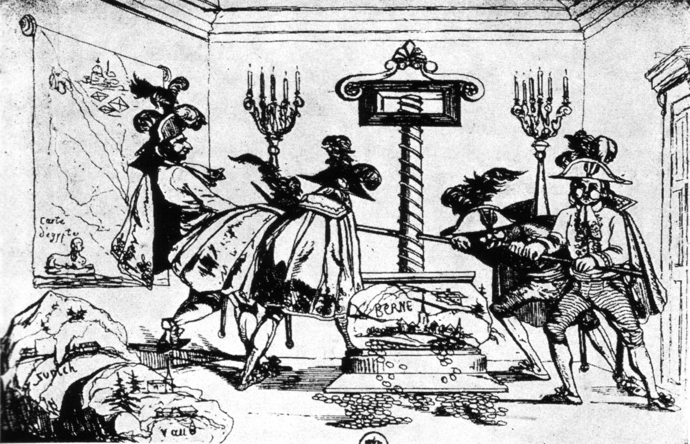 «L'or de la Suisse achètera l'Egypte – Das Gold der Schweiz wird Ägypten kaufen». Karikatur aus Frankreich auf die Plünderung der alten Eidgenossenschaft durch die französische Armee im Herbst 1798 und die damit verbundene Finanzierung des Ägyptenfeldzugs Napoleons. Im Schraubstock wird gerade der Stein «Berne» ausgepresst, während die Steine «Zurich» und «Vaud» im Vordergrund links noch bereit liegen. Die Wandkarte im Hintergrund links zeigt Ägypten mit den Pyramiden und der Sphinx.